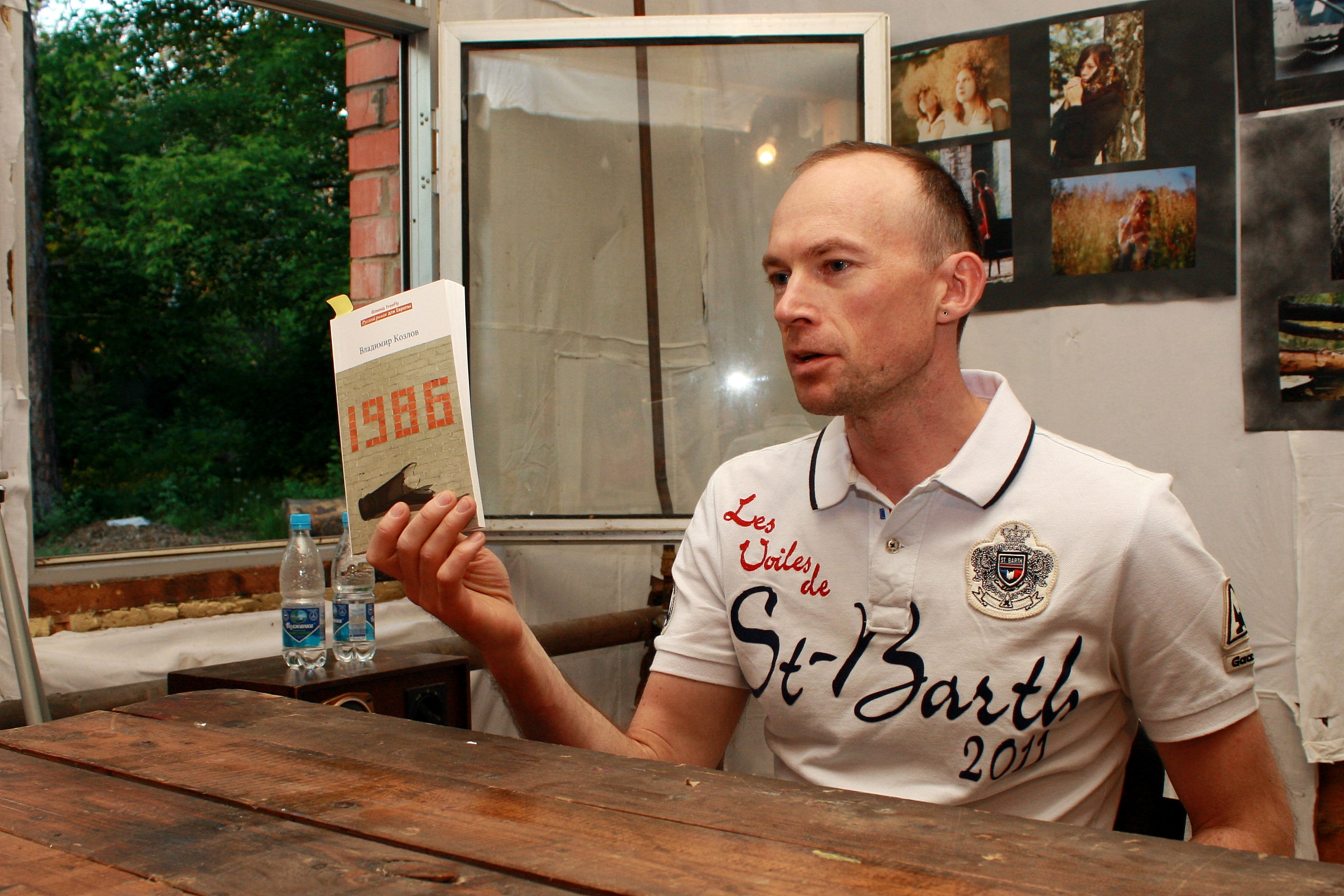 Владимир Козлов на презентации романа "1986" в г.Тольятти. Весна 2012 г.